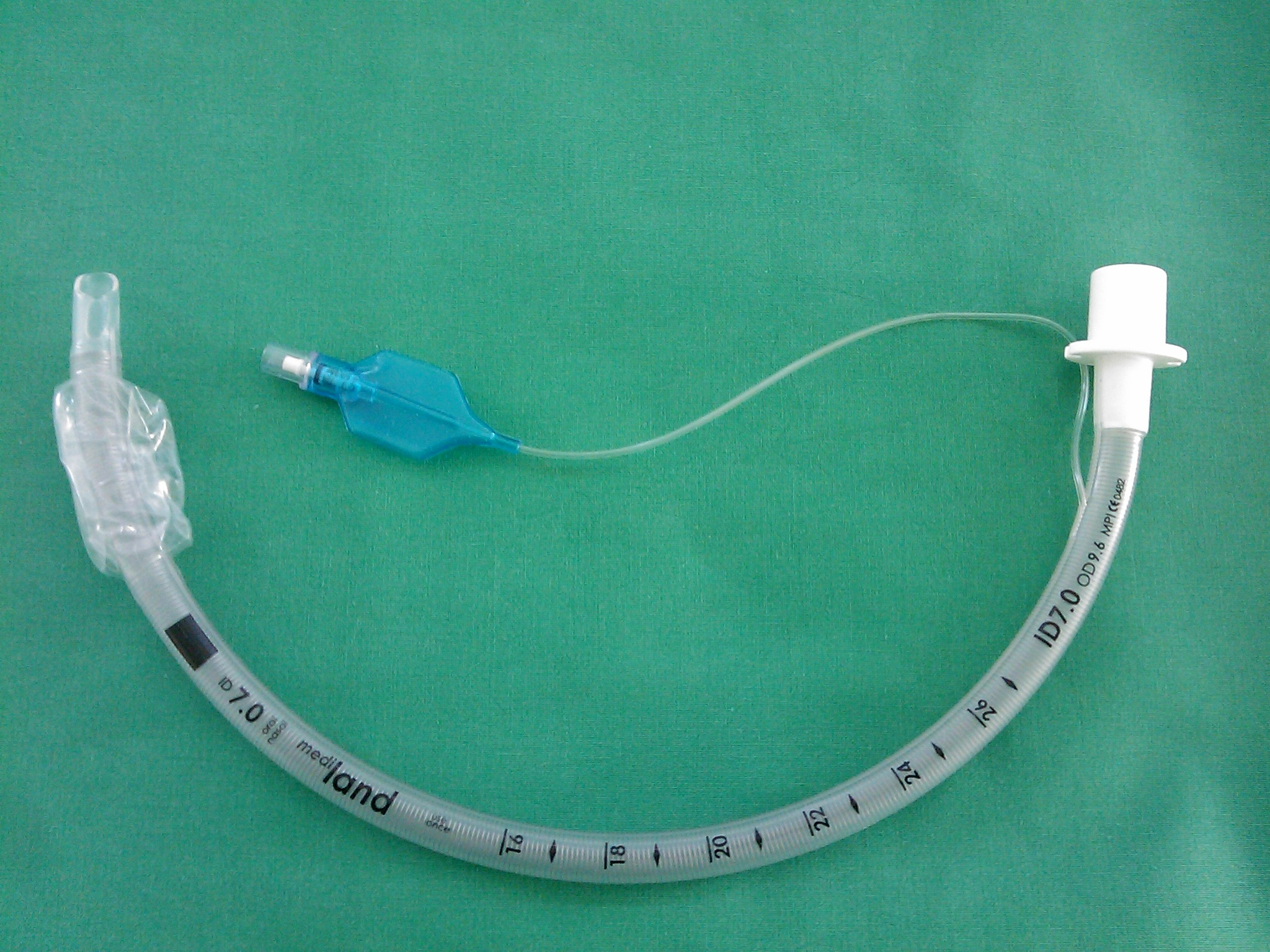 Nəfəs borusu - traxeya üçün intubasion boru